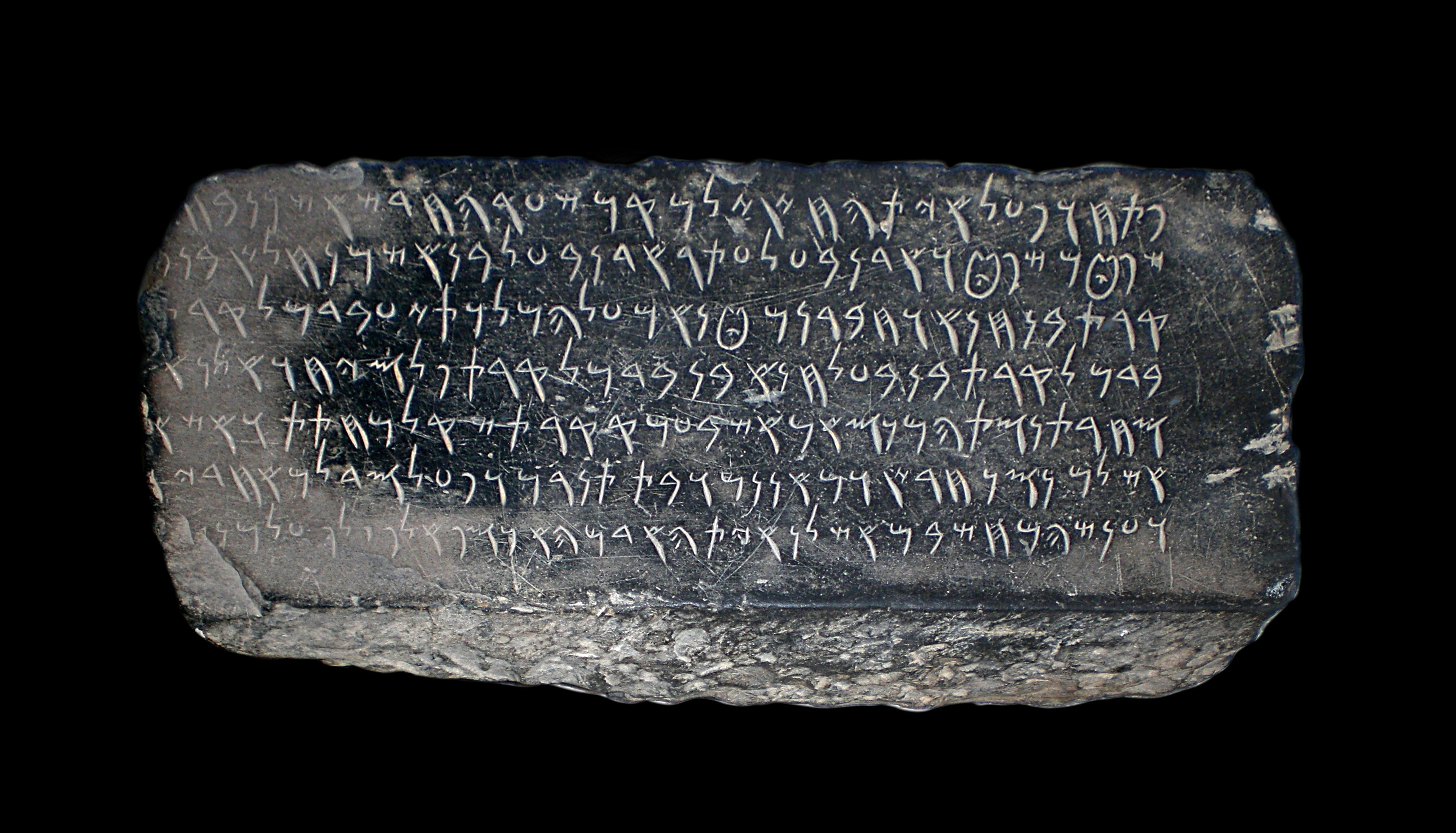 Inscription en langue phénicienne trouvée sur le site archéologique de Carthage dans les années 1960 et conservée au musée national de Carthage.